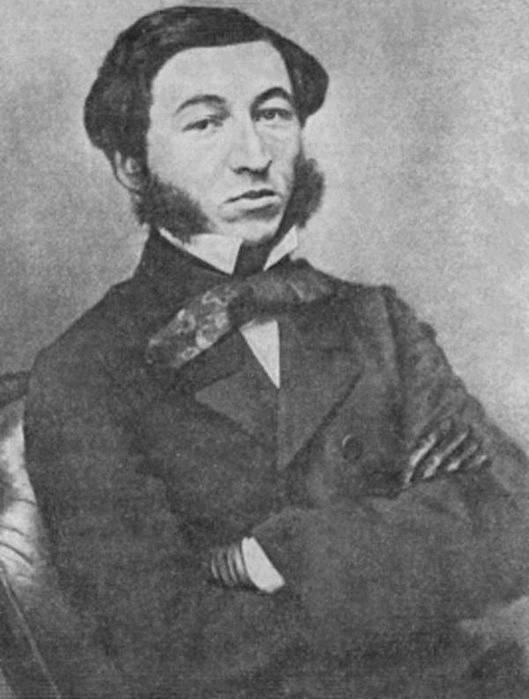 Mikael Nalbandian